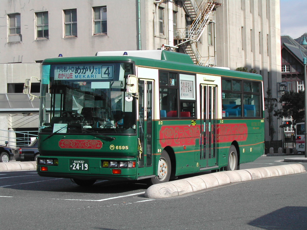 ４番で、運行時代 門司港駅にて